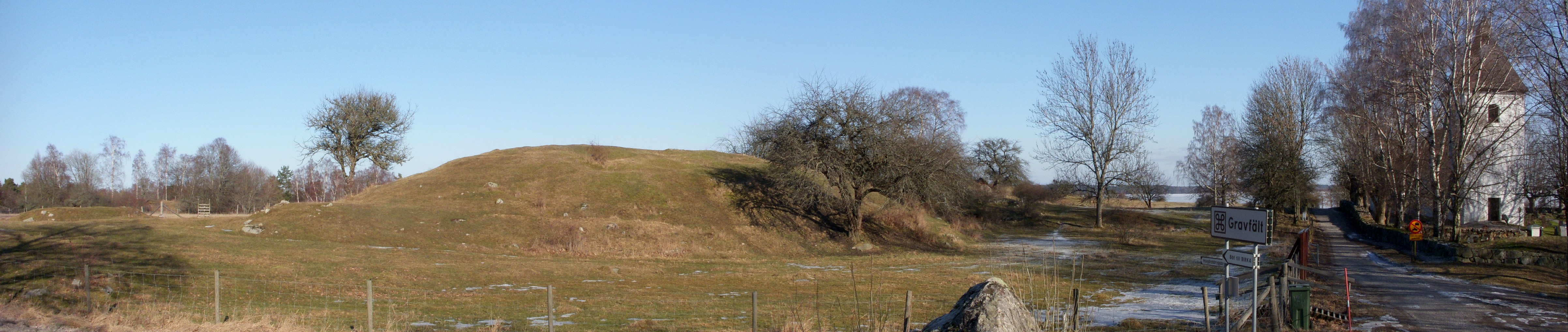 Vy över Hovgården och kungshögaran på Adelsön med Adelsö kyrka längs till höger